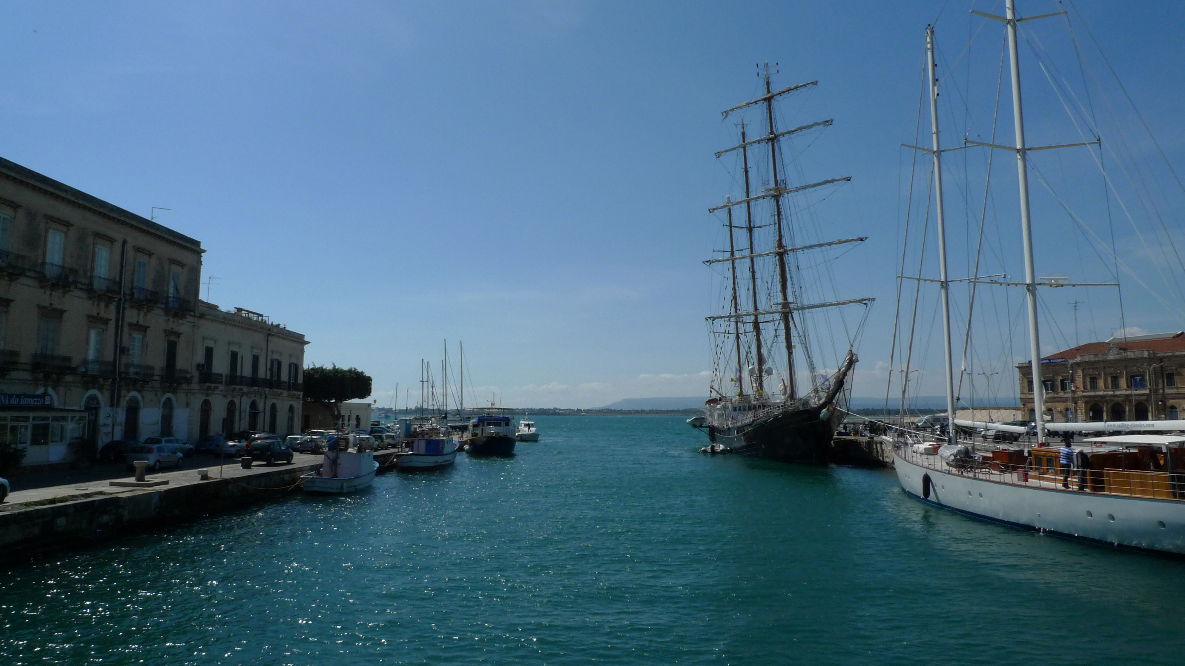 Velieri al porto aretuseo